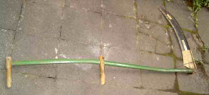 Séissel